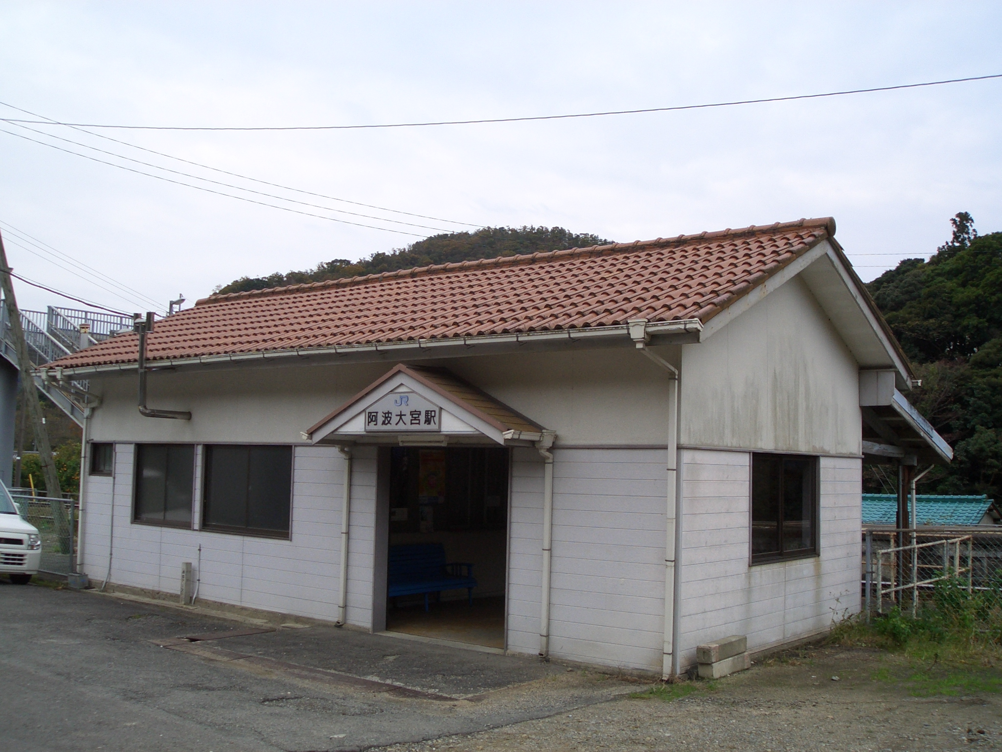 阿波大宮駅駅舎